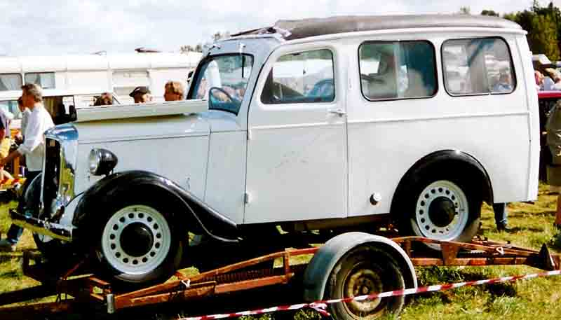 Bradford